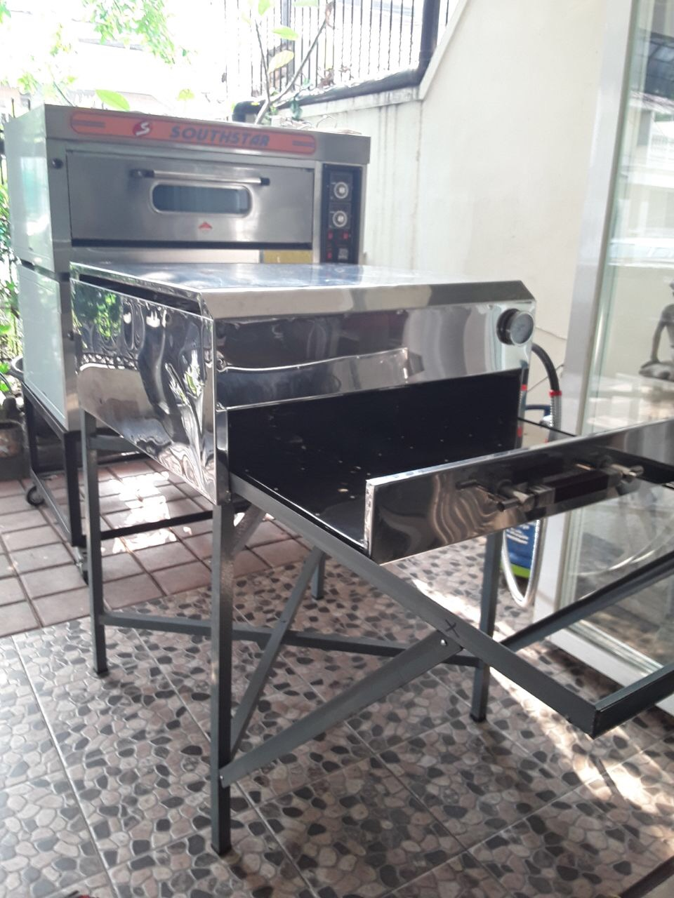 Oven laci.